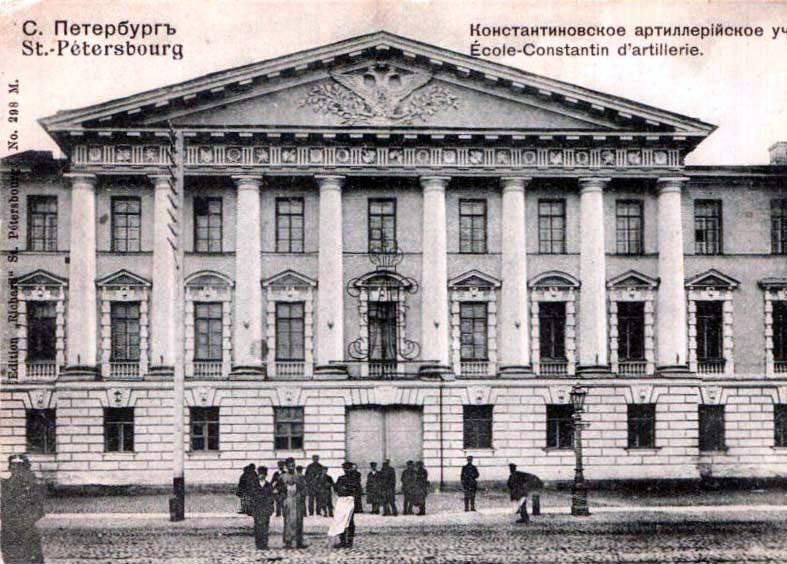 Константиновское артиллерийское училище (открытка, начало XX века); Вестник архивиста, 2016, №3.